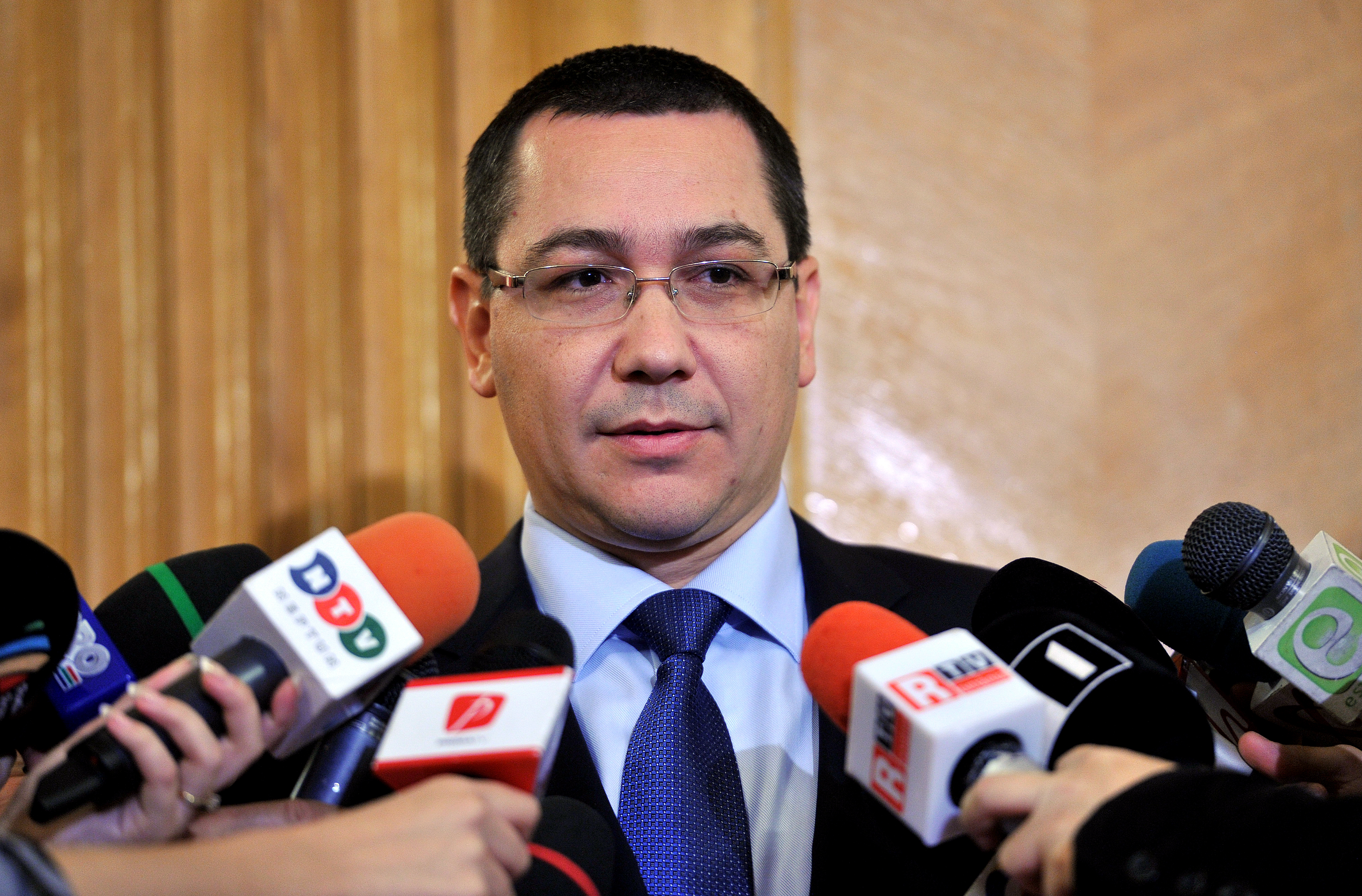 Victor Ponta la Palatul Parlamentului - 03.12.2013 (5)